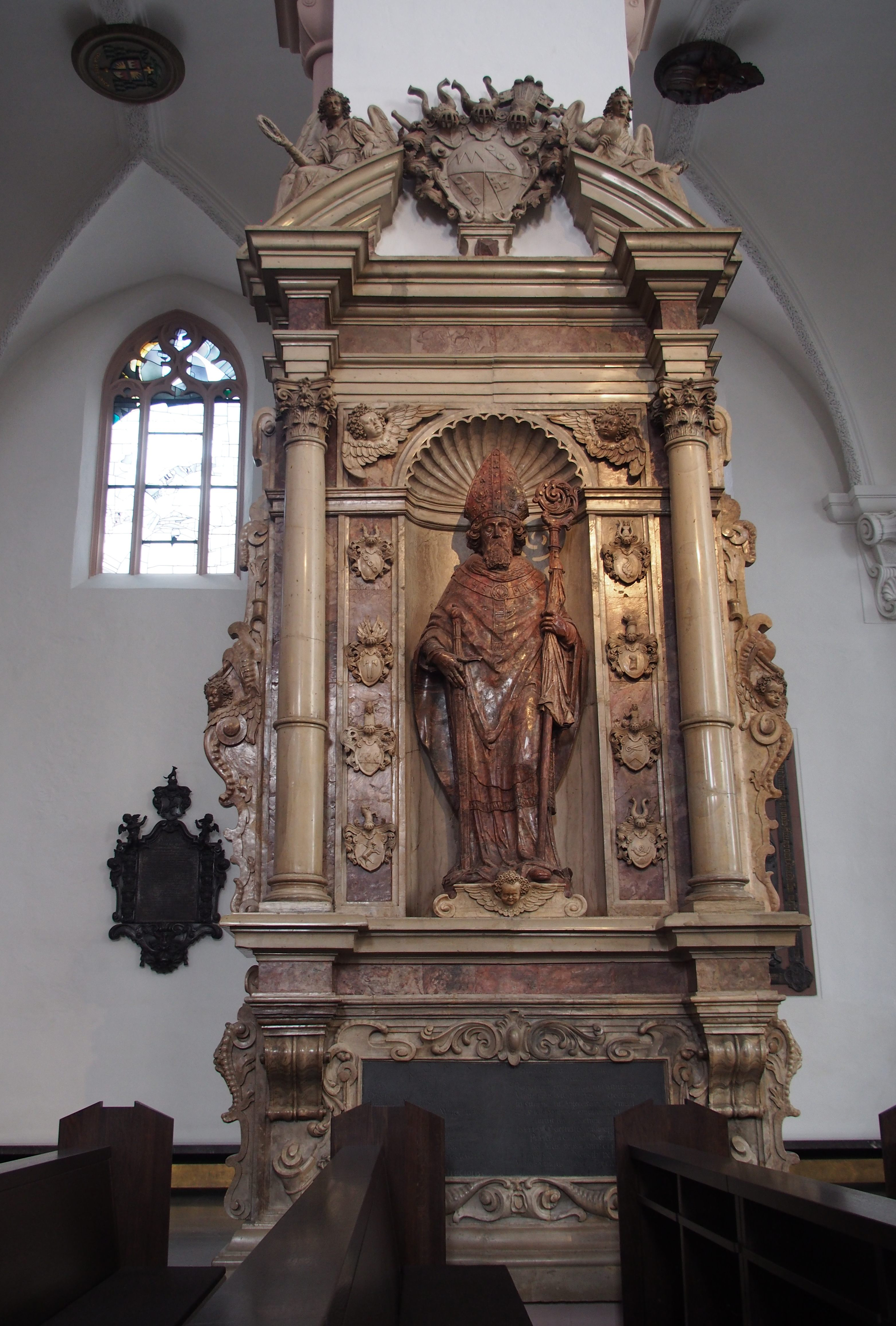 Bischofsgrabmal Julius Echter von Mespelbrunn im Würzburger Dom